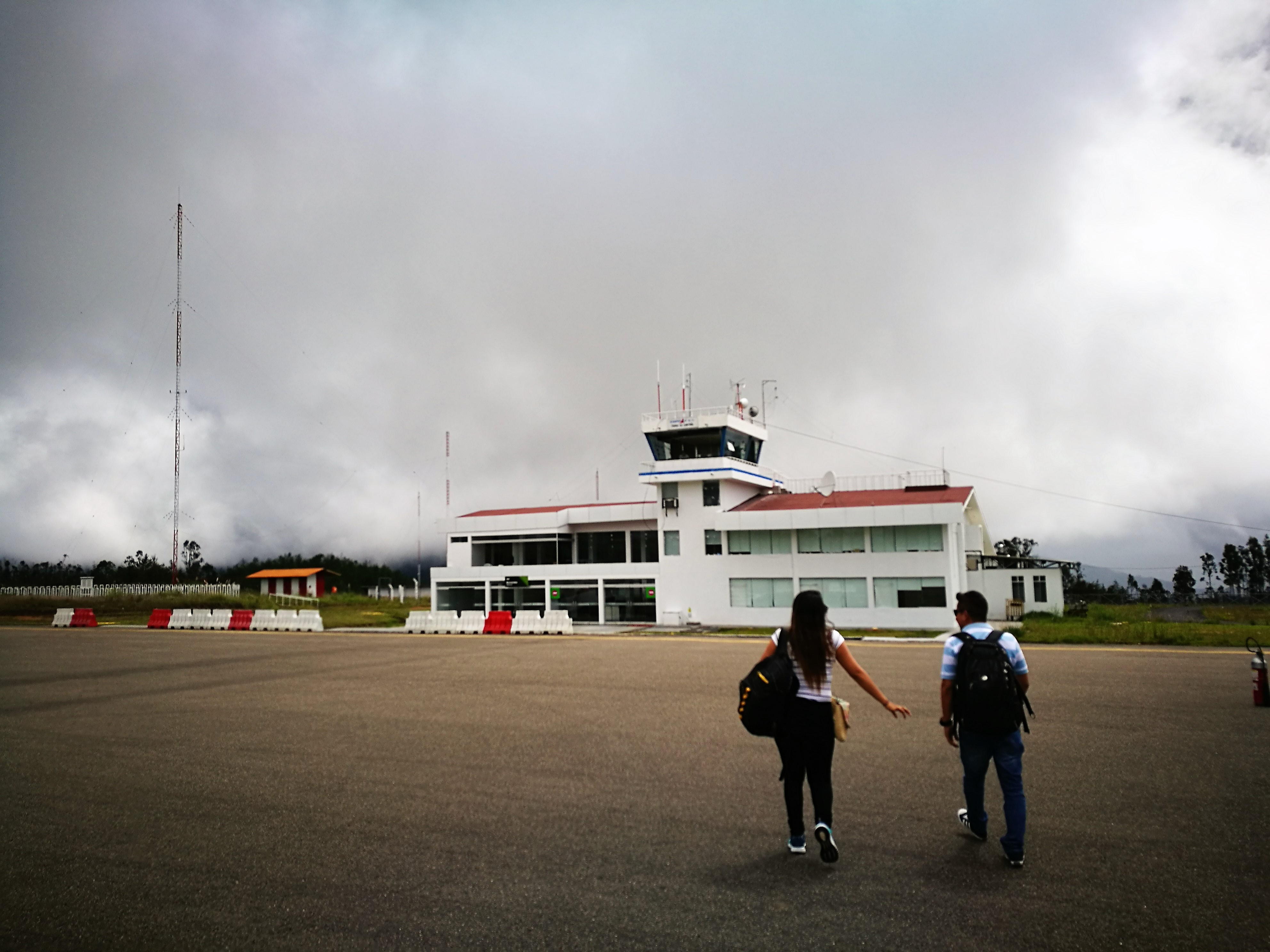 Terminal de l'Aeropuerto de Chachapoyas des de les pistes